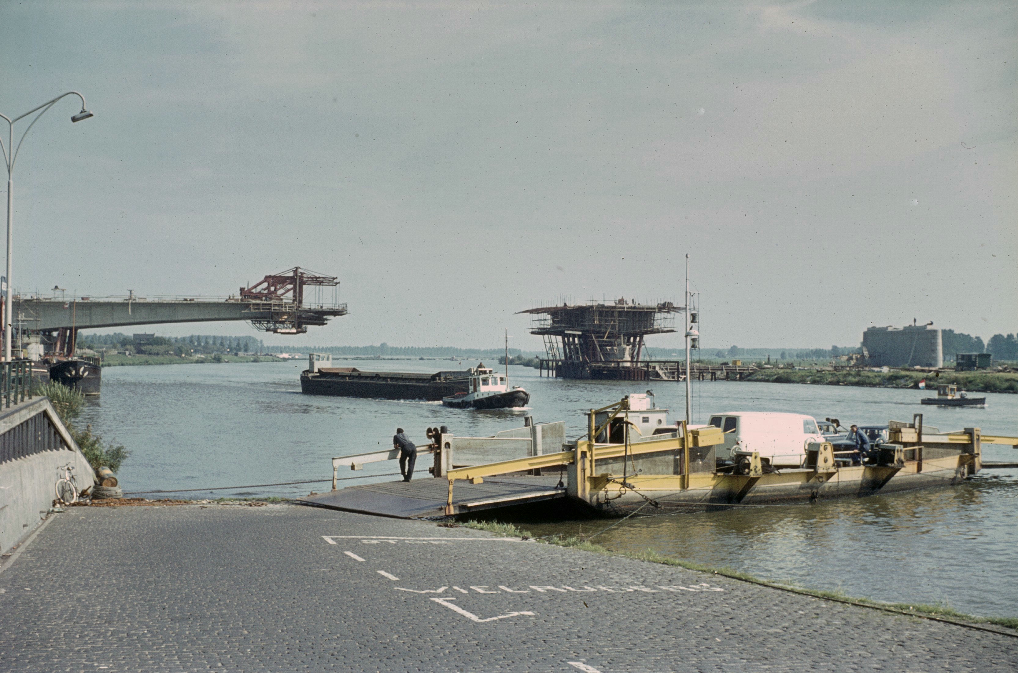 Brug: Brug over de Maas in aanbouw